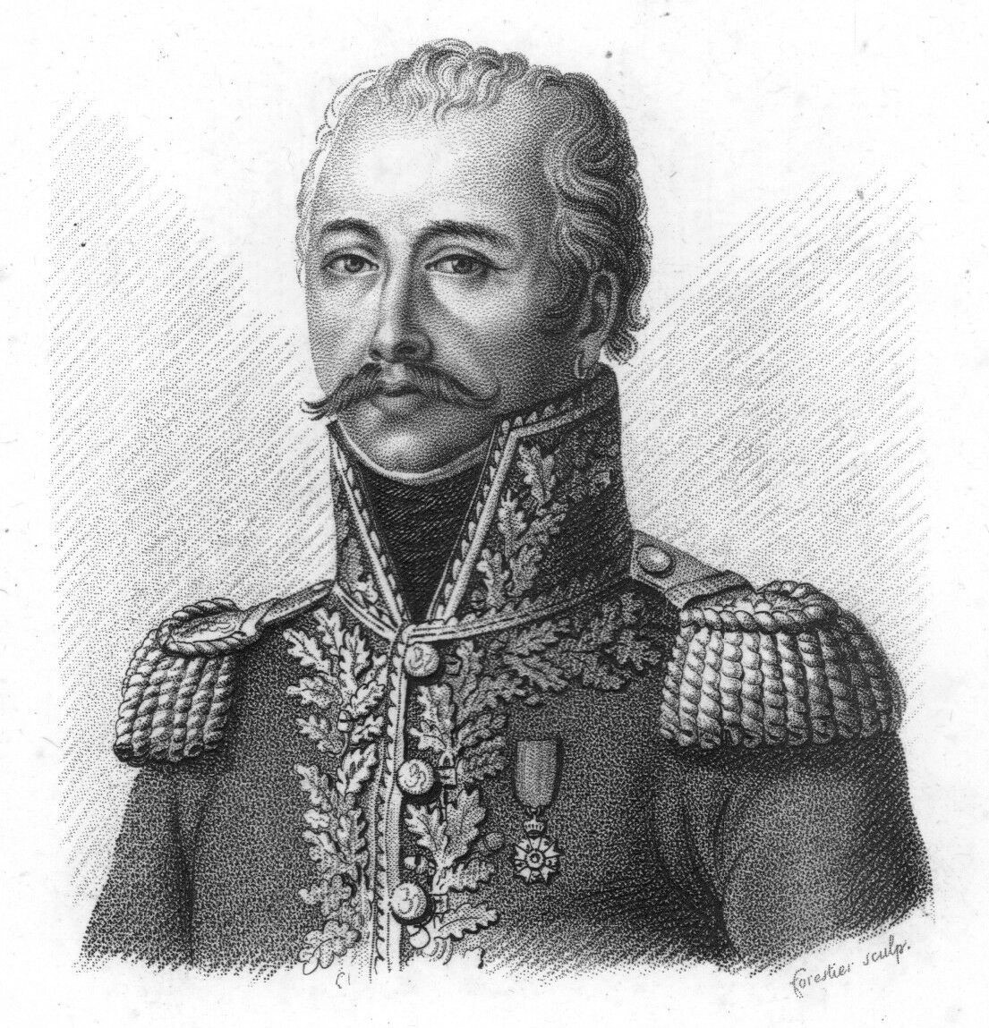 portrait gravé du Général Delmas (1768-1813). Antoine Guillaume Muralhac Delmas de La Coste dit Antoine Guillaume Delmas, général de la Révolution Française, mort à Leipzig en 1813